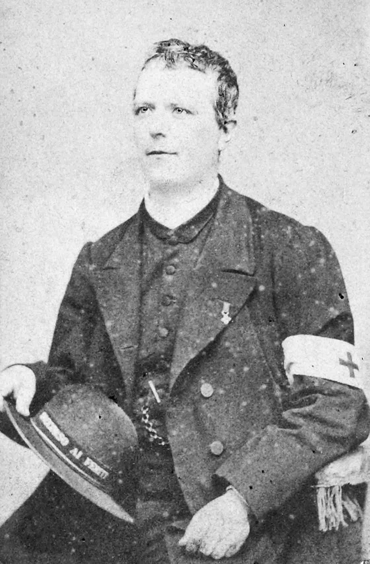 Antonio Stoppani nel 1866